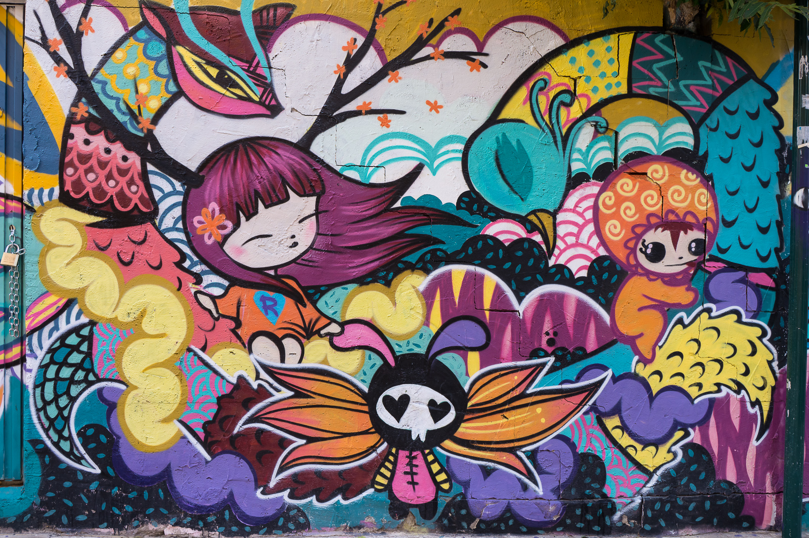 Julieta - 26